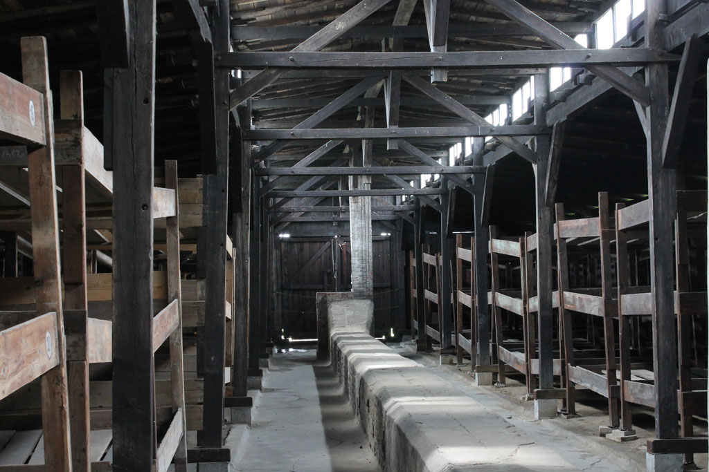 Interior de los dormitorios del campo de concentración de Auschwitz.